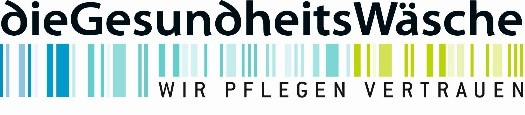 Logo von dieGesundheitsWäsche